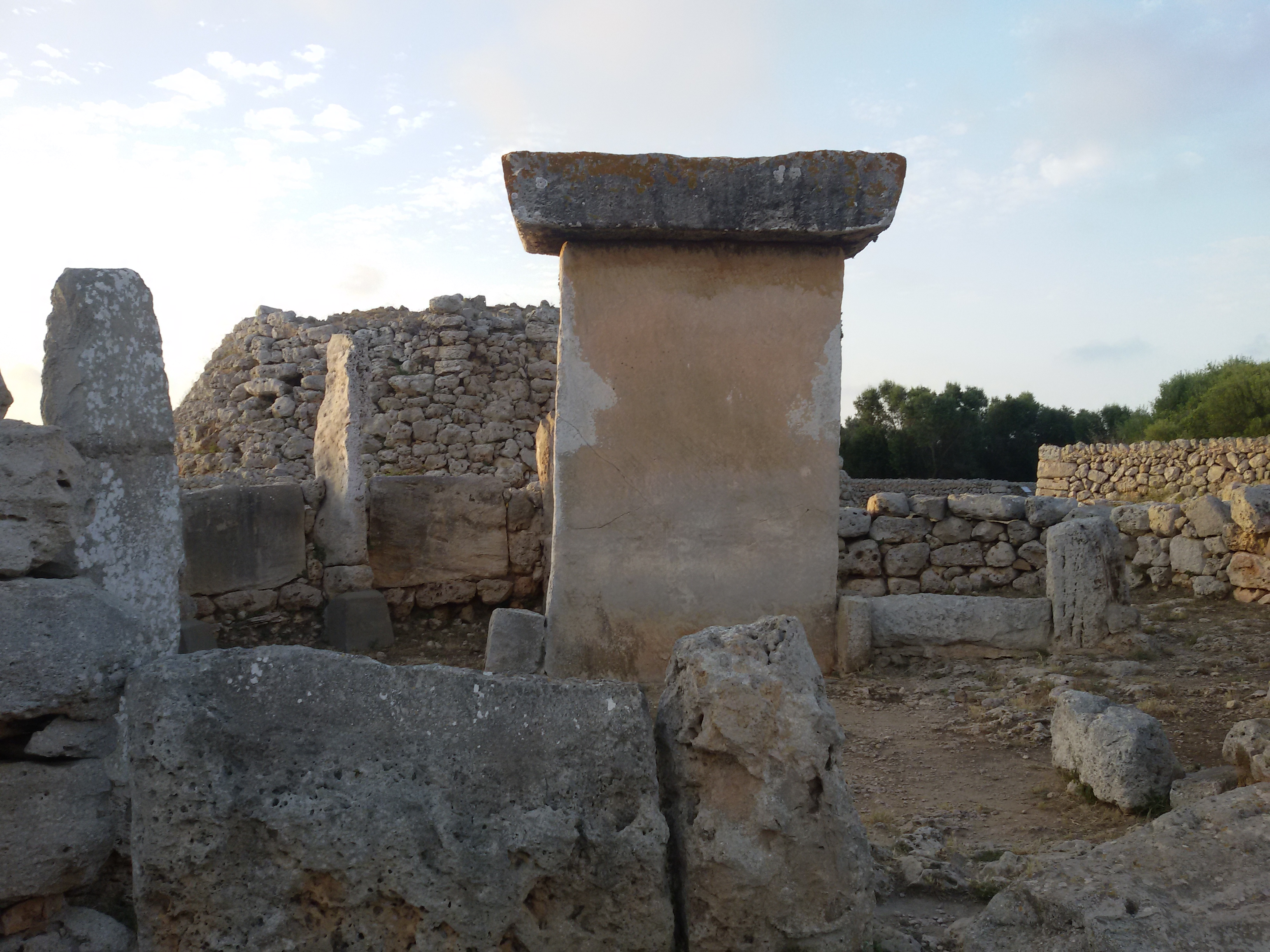 Taula de Trepucó en primer plano (detrás de ve el talayot), poblado tayótico de Trepucó, Mahón, Menorca, Islas Baleares, España